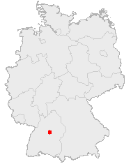 Karte Esslingen in deutschland